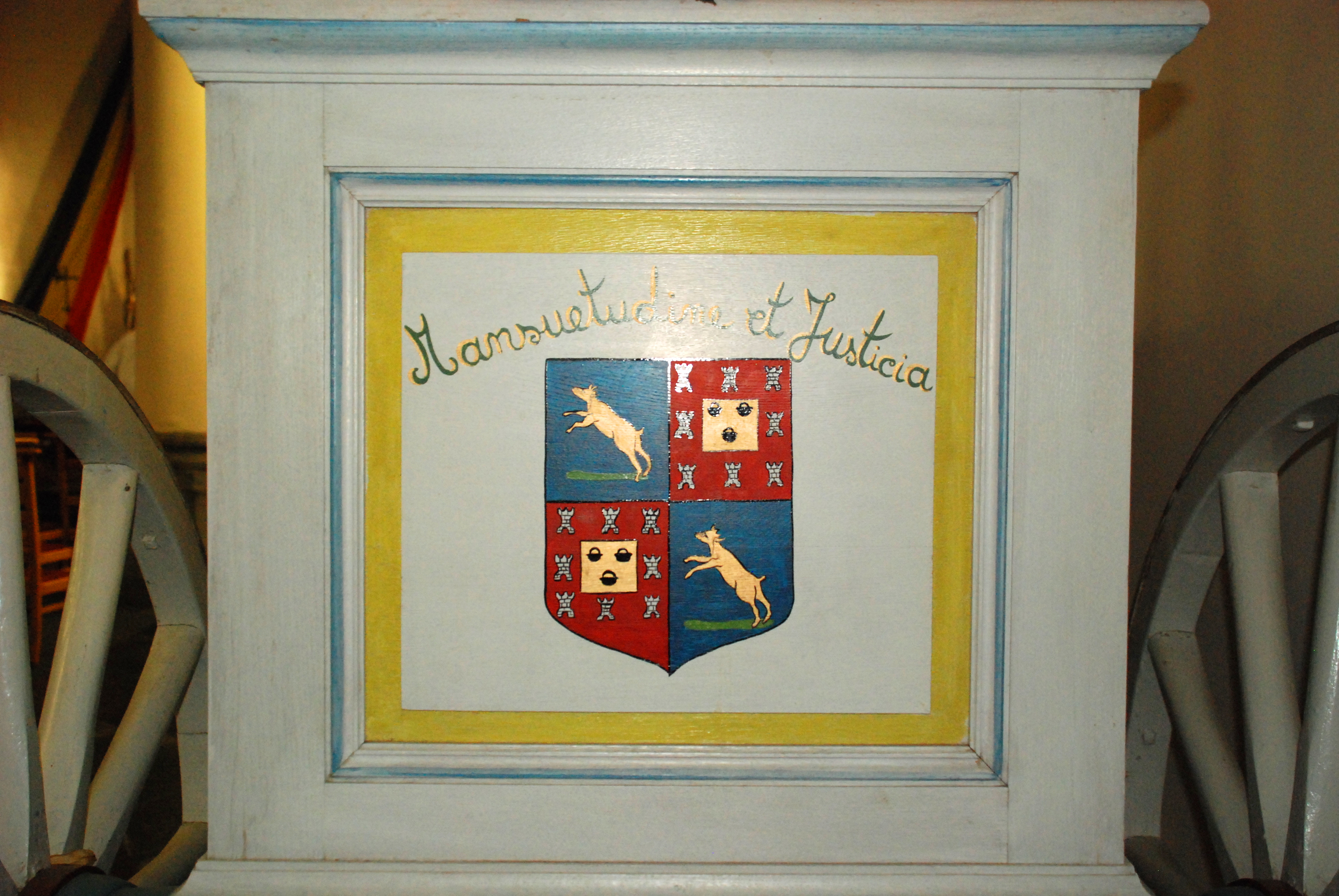 Belgique - Église Saint-Barthélemy de Bousval - Char de Saint-Barthélemy